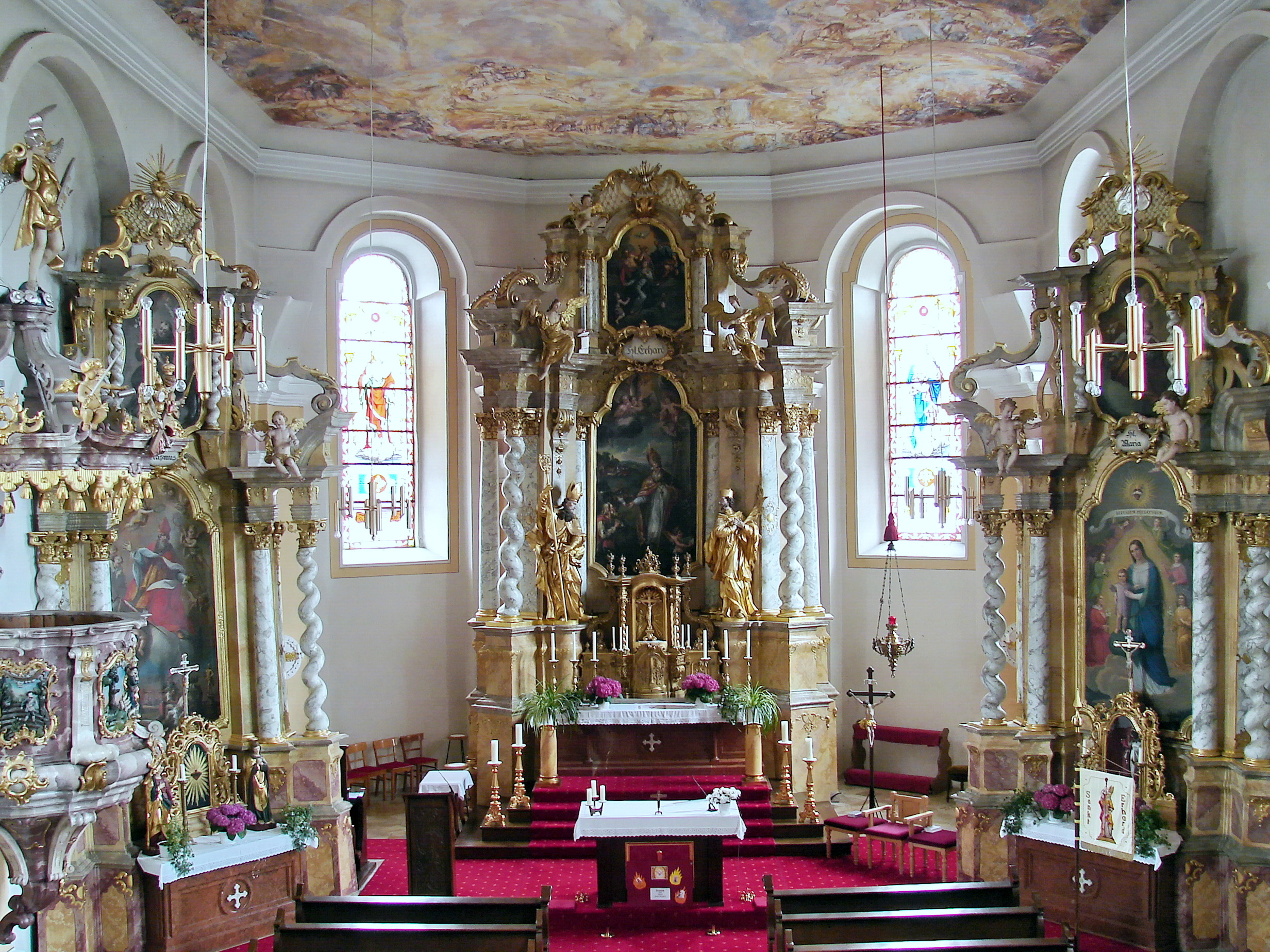 Katholische Pfarrkirche St. Erhard in Rainertshausen